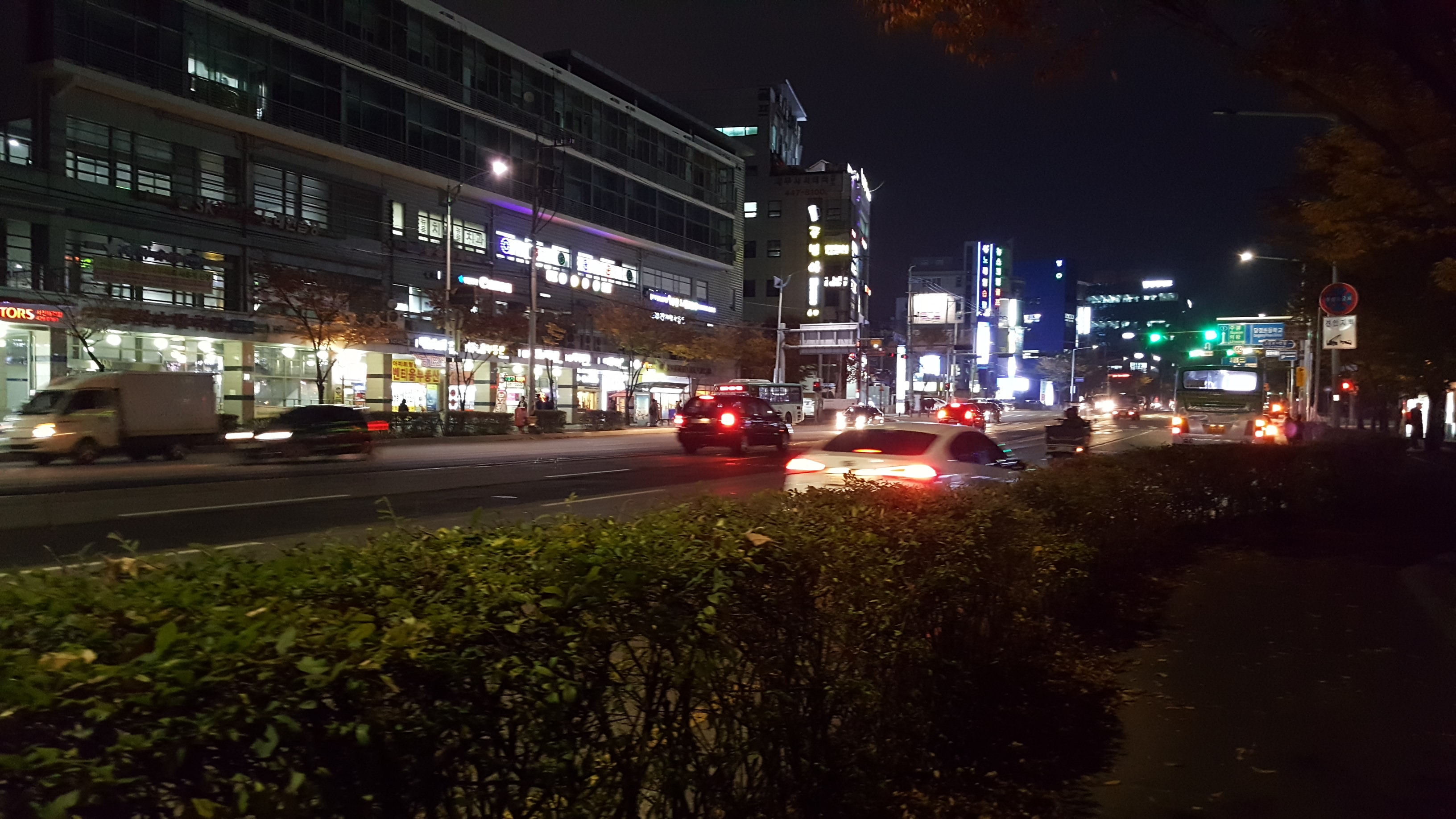 군포시 당정동 고산로의 모습